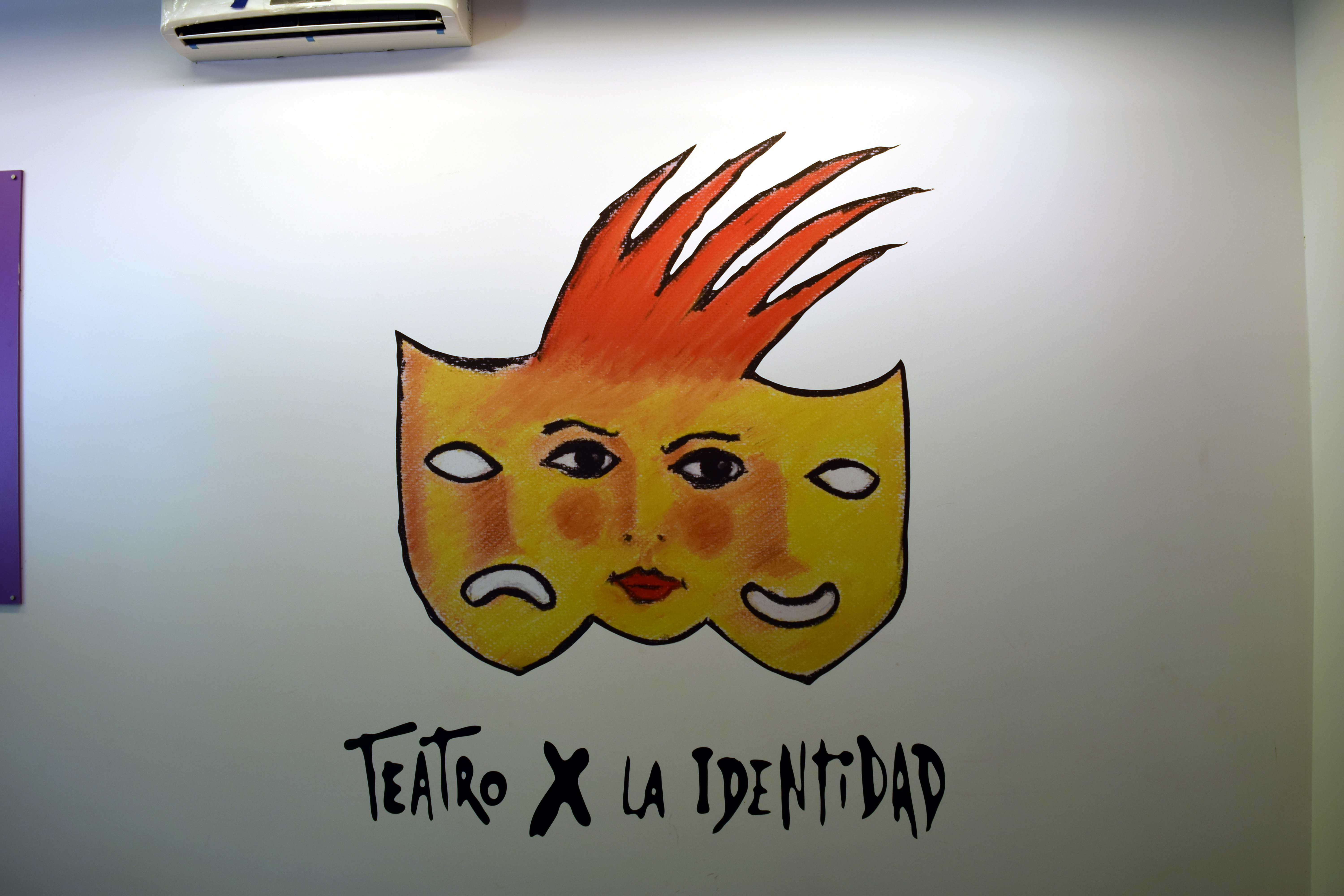 Sala dedicada al Teatro por la identidad dentro de la Casa por la Identidad ubicada en el predio de la ex ESMA y que forma parte de la rama cultural de las Abuelas de Plaza de Mayo.